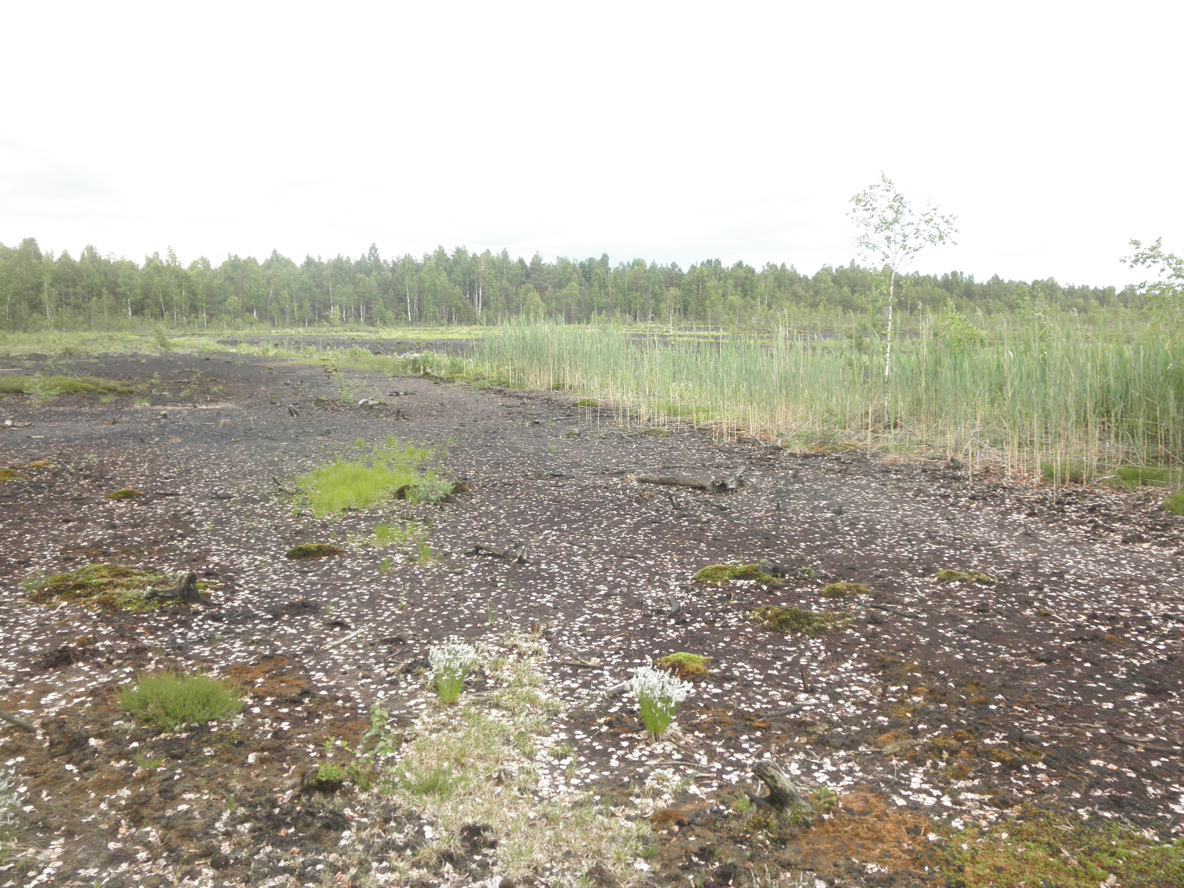 Võrumaal Madise külas asuv jääksoo